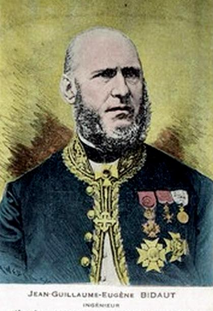 Portrait Eugène Bidaut